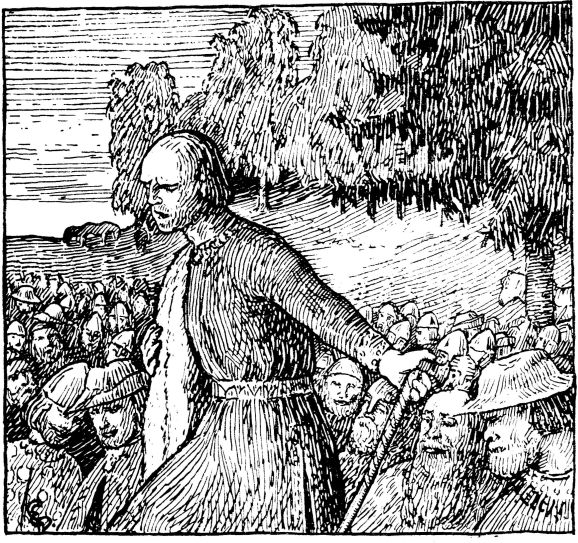 Halfdan Egedius: Illustration for Olav Trygvasons saga. Snorre 1899-edition. «Den mest veltalende Bonde reiser sig og vil tale.» nb: «Den mest veltalende bonden reiser seg og vil tale.» nn: «Den mest ordføre av bøndene reiser seg og vil tale.»